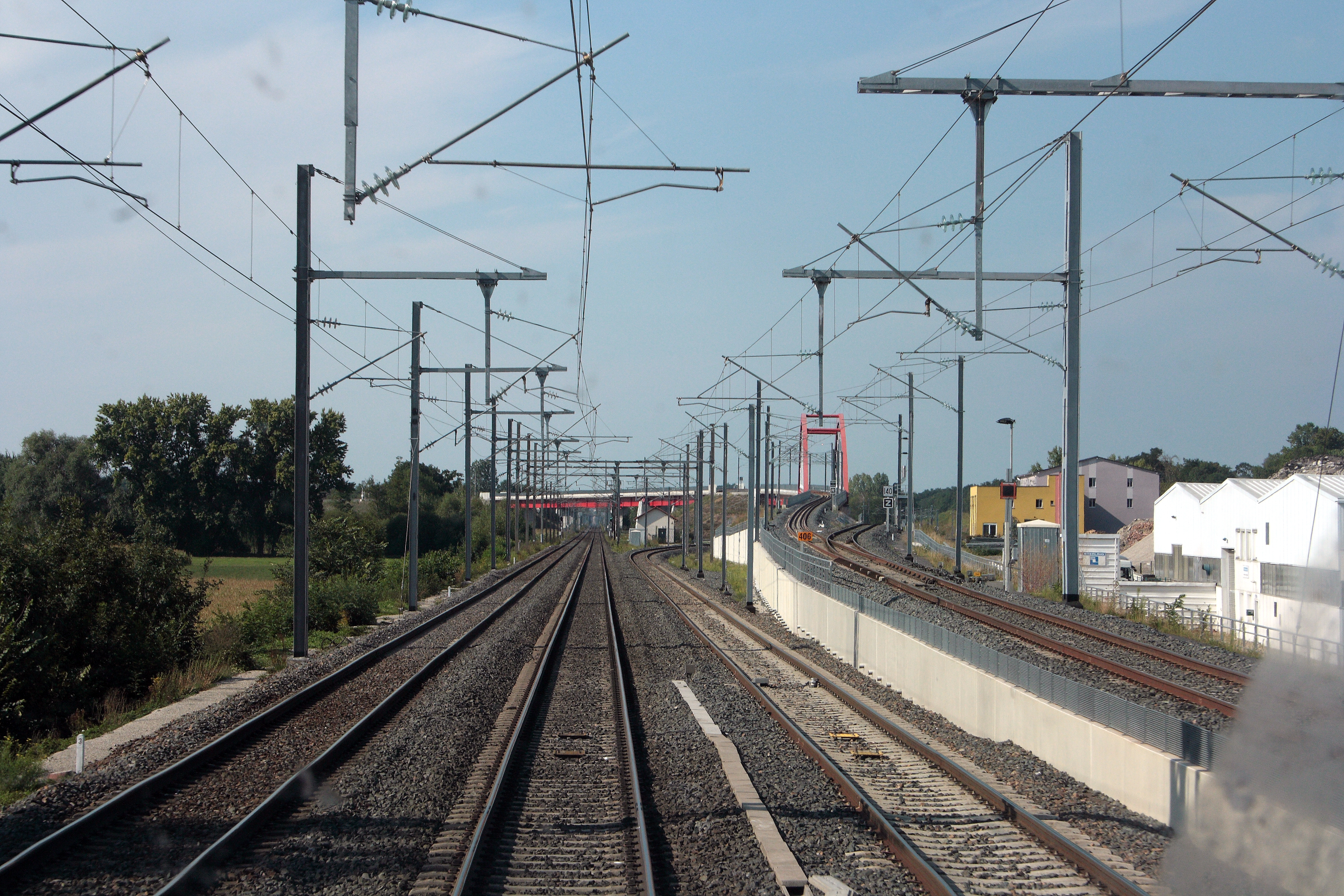 Les voies du raccordement de Vendenheim, faisant partie de la ligne de Paris à Strasbourg (LGV), franchissent la ligne de Noisy-le-Sec à Strasbourg-Ville [ligne classique Paris – Strasbourg], puis se raccordent à celles de la ligne de Vendenheim à Wissembourg [note : en outre, la voie 2 de la LGV enjambe par un bow-string la voie 2 de cette dernère ligne], le tout à environ deux kilomètres au nord de la gare de Vendenheim.Cette disposition compexe permet le changement de sens de circulation des trains : ce dernier est normalement à gauche sur les LGV, tandis qu'il est à droite sur les lignes classiques d'Alsace-Moselle.